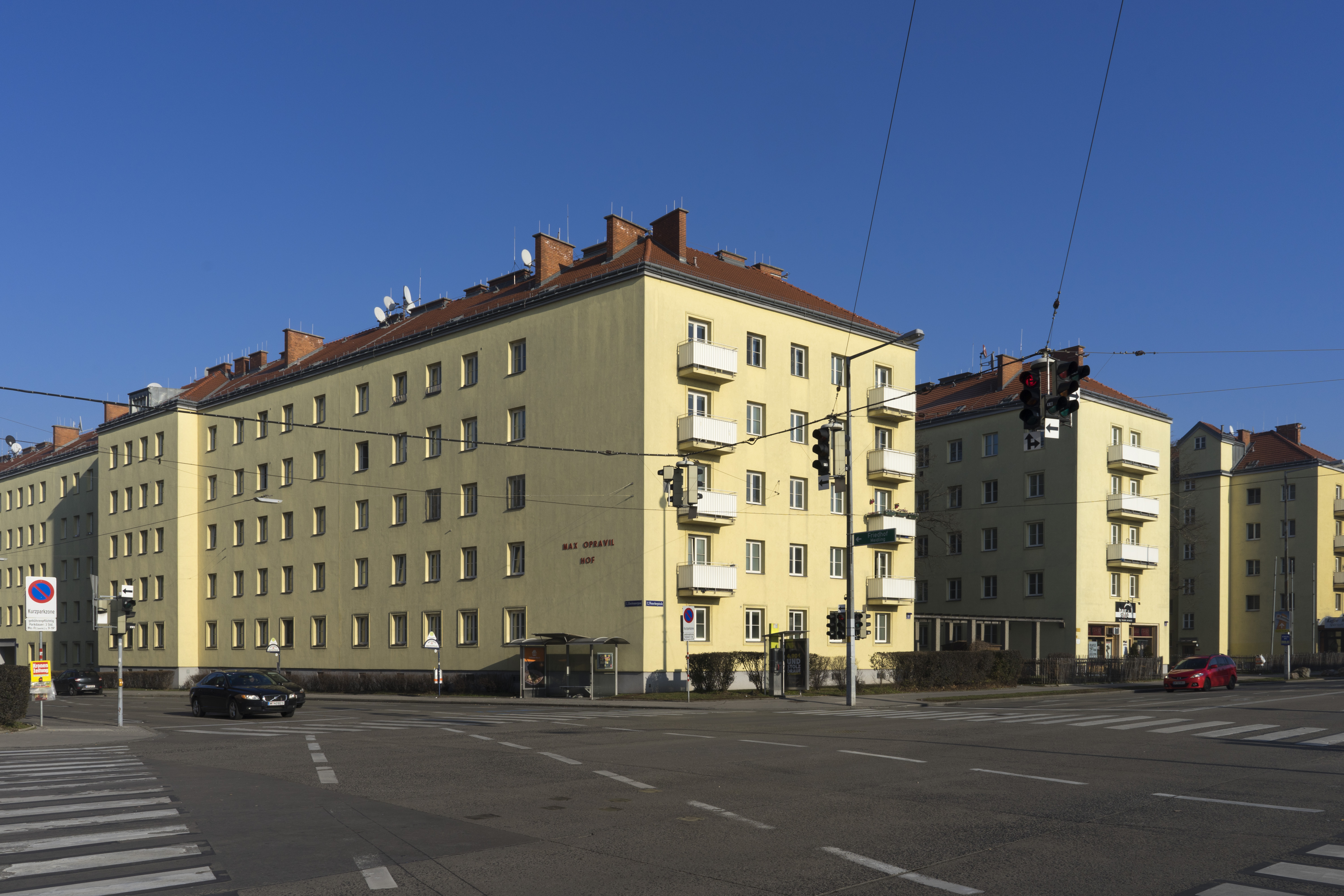 Max-Opravil-Hof This media shows the Vienna residential building (Gemeindebau) with the ID 159.